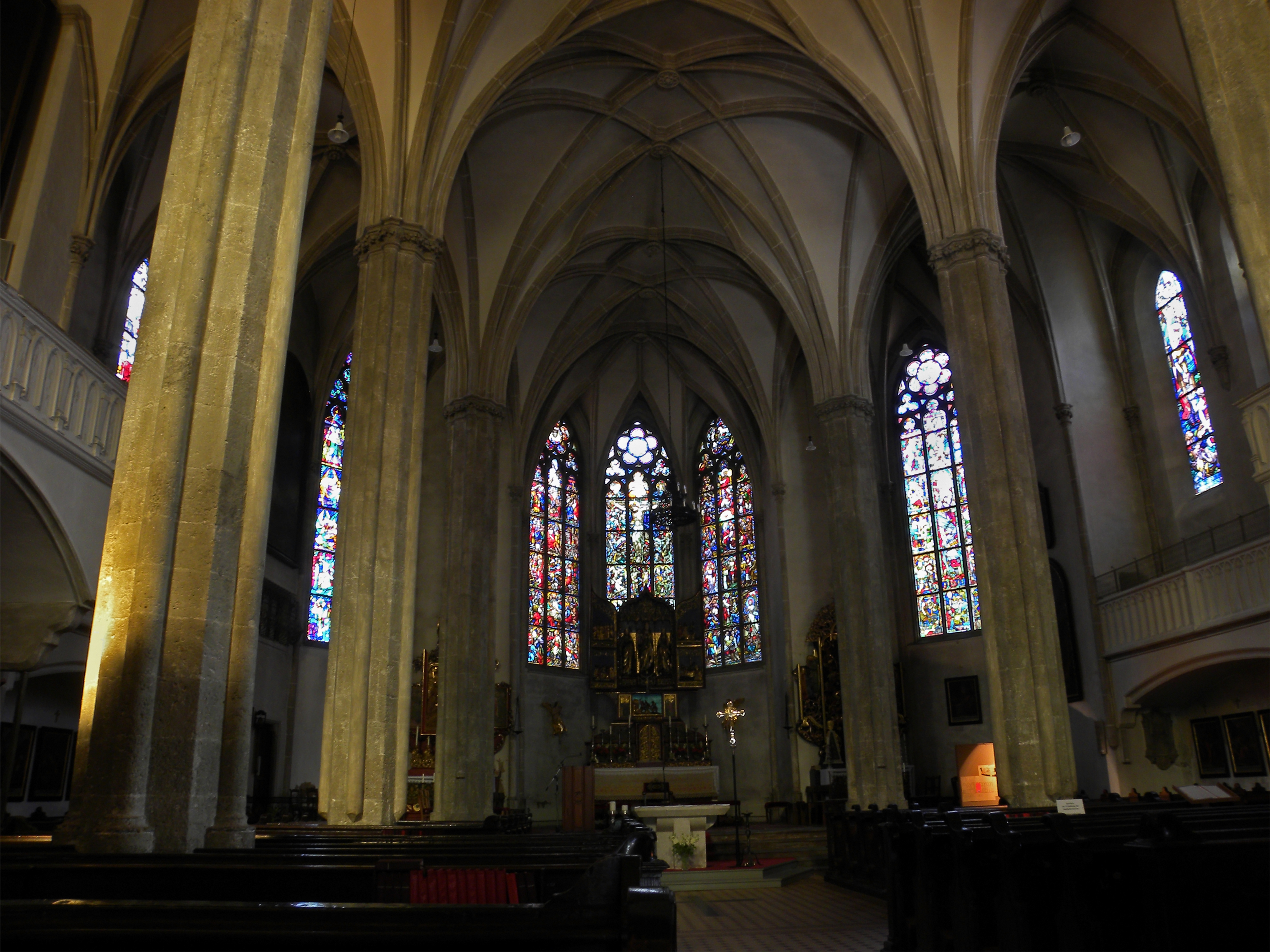 Innenansicht der Pfarrkirche hll. Maria Magdalena und Lambert